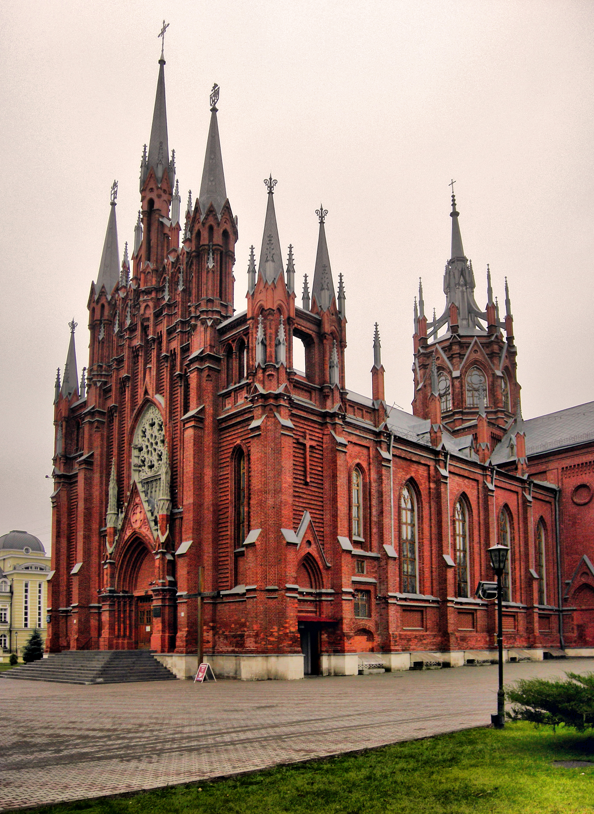 Католический собор в Москве.